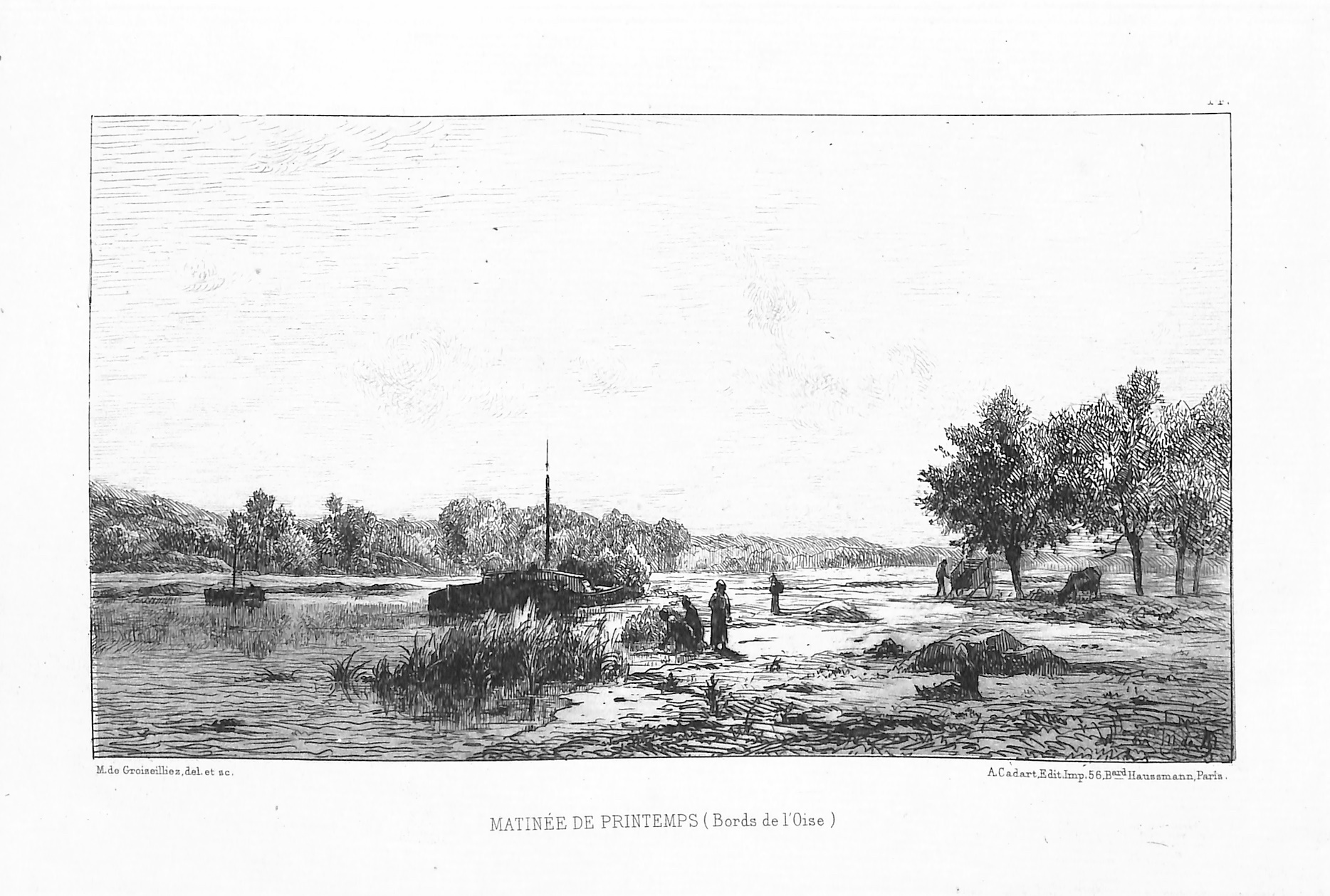 Eau-forte originale de Marcellin de Groiseilliez intitulé "MATINÉE DE PRINTEMPS (Bords de l'Oise)"; imprimé par Alfred Cadart, éditeur-imprimeur, 56 boulevard Haussmann à Paris